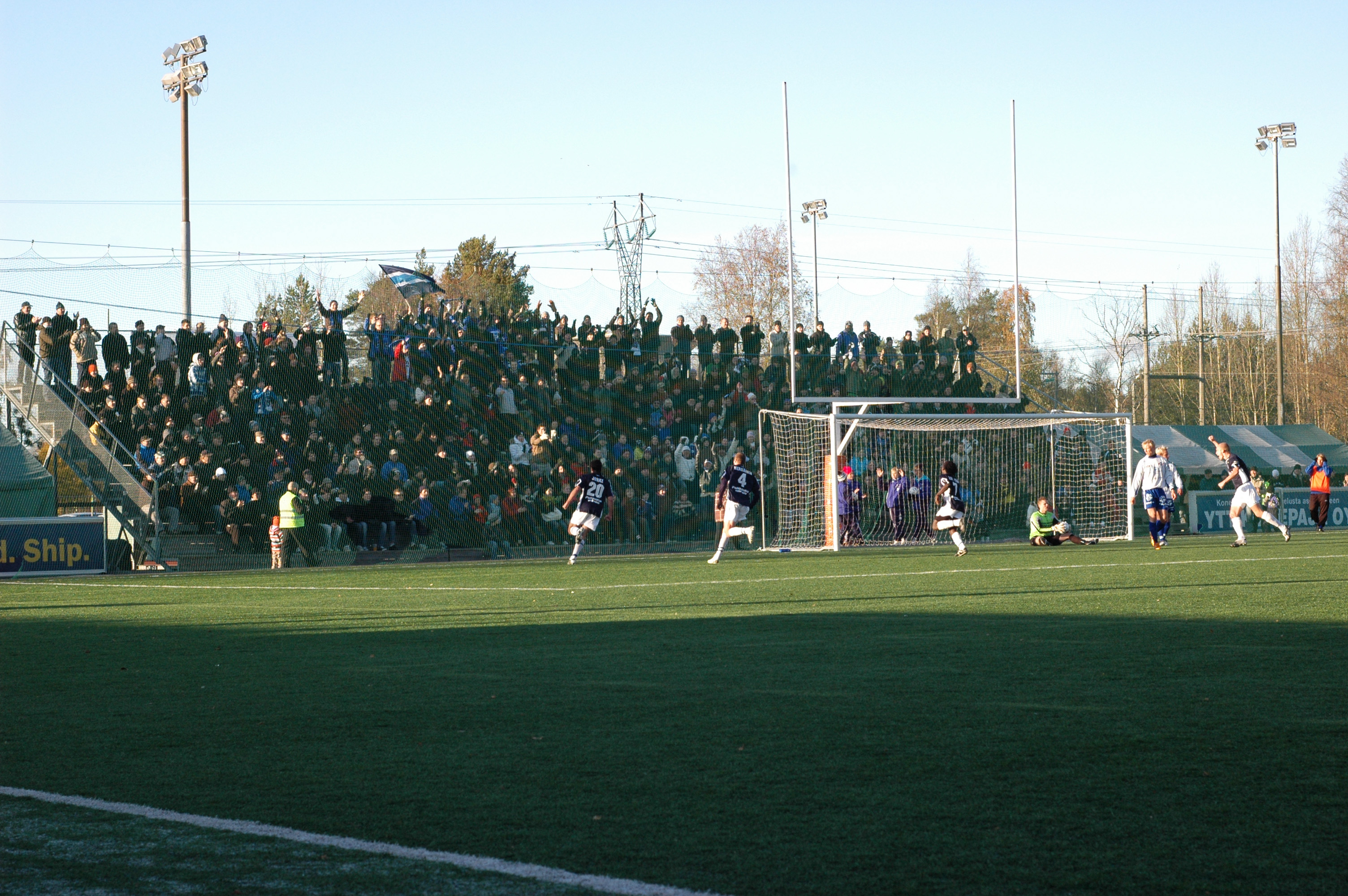 AC Oulu - FC Hämeenlinna 11.10.2009, Castrenin kenttä